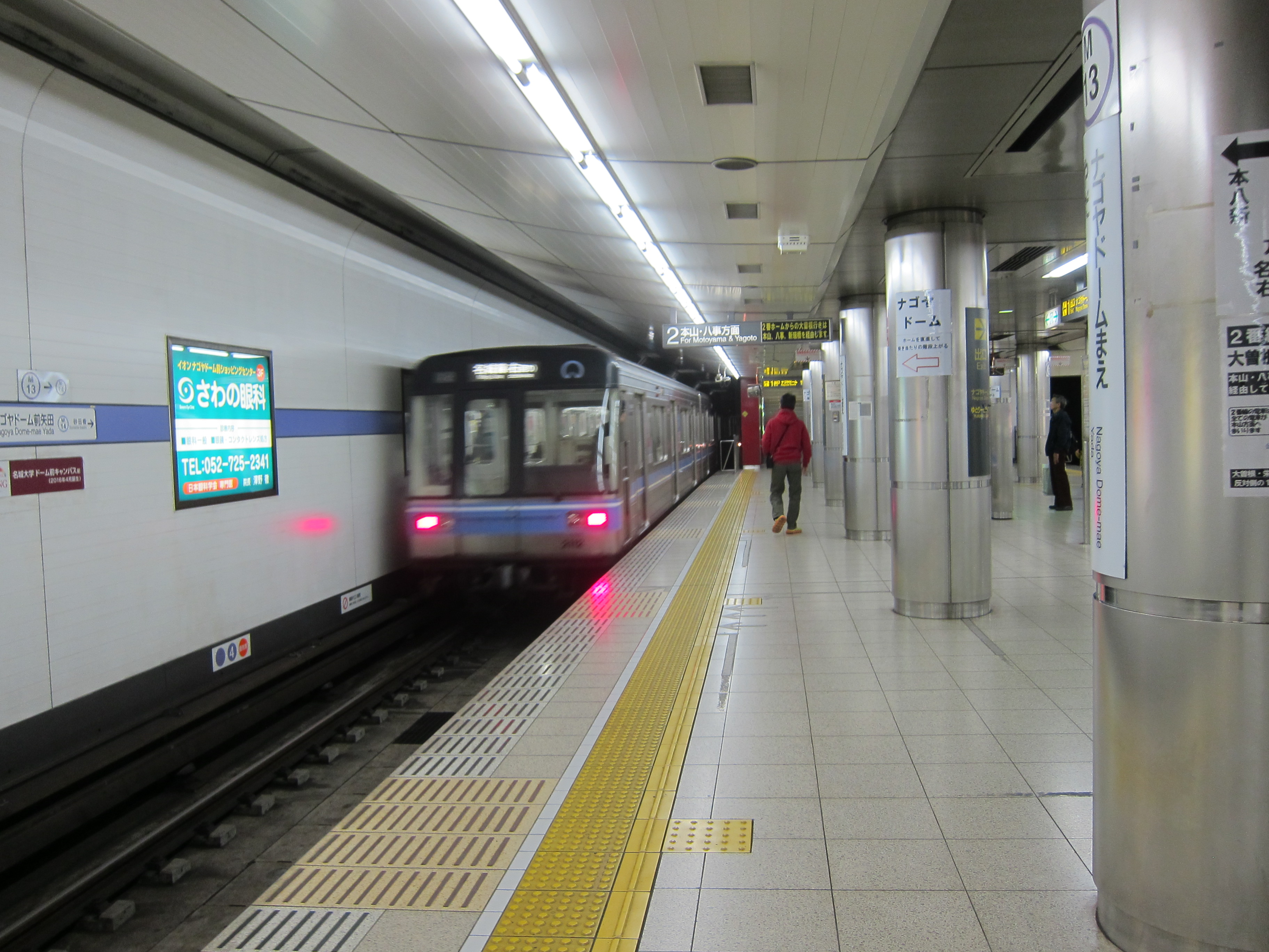 nagoya subway